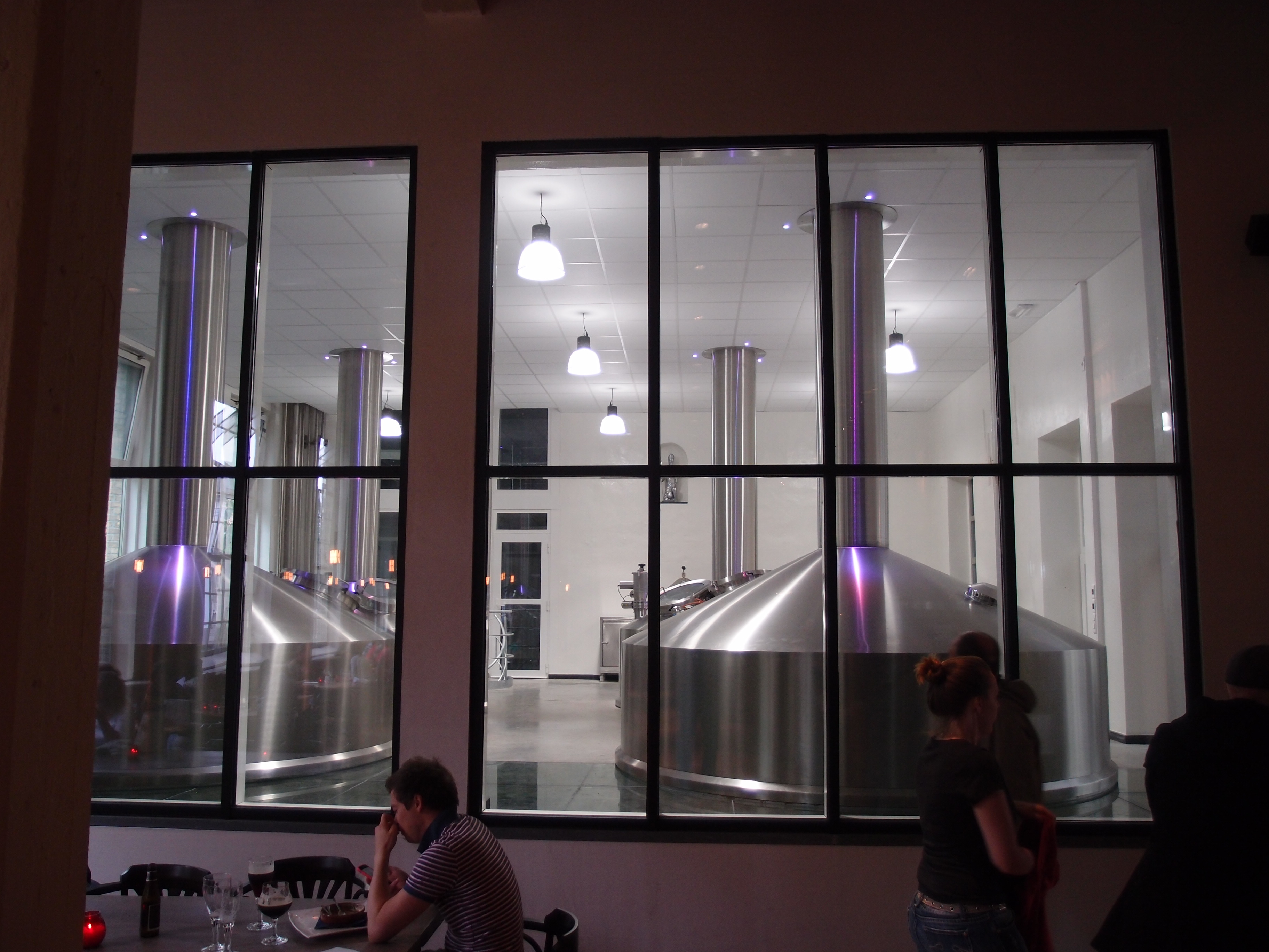 Belgische Brauerei "De Halve Maan" in Brügge Datum: 12.07.2014 Urheber: M. Pfeiffer alias Benutzer:Gordito1869 Quelle: Privates Fotoarchiv des Urhebers